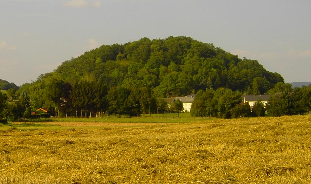 Lüxeberg